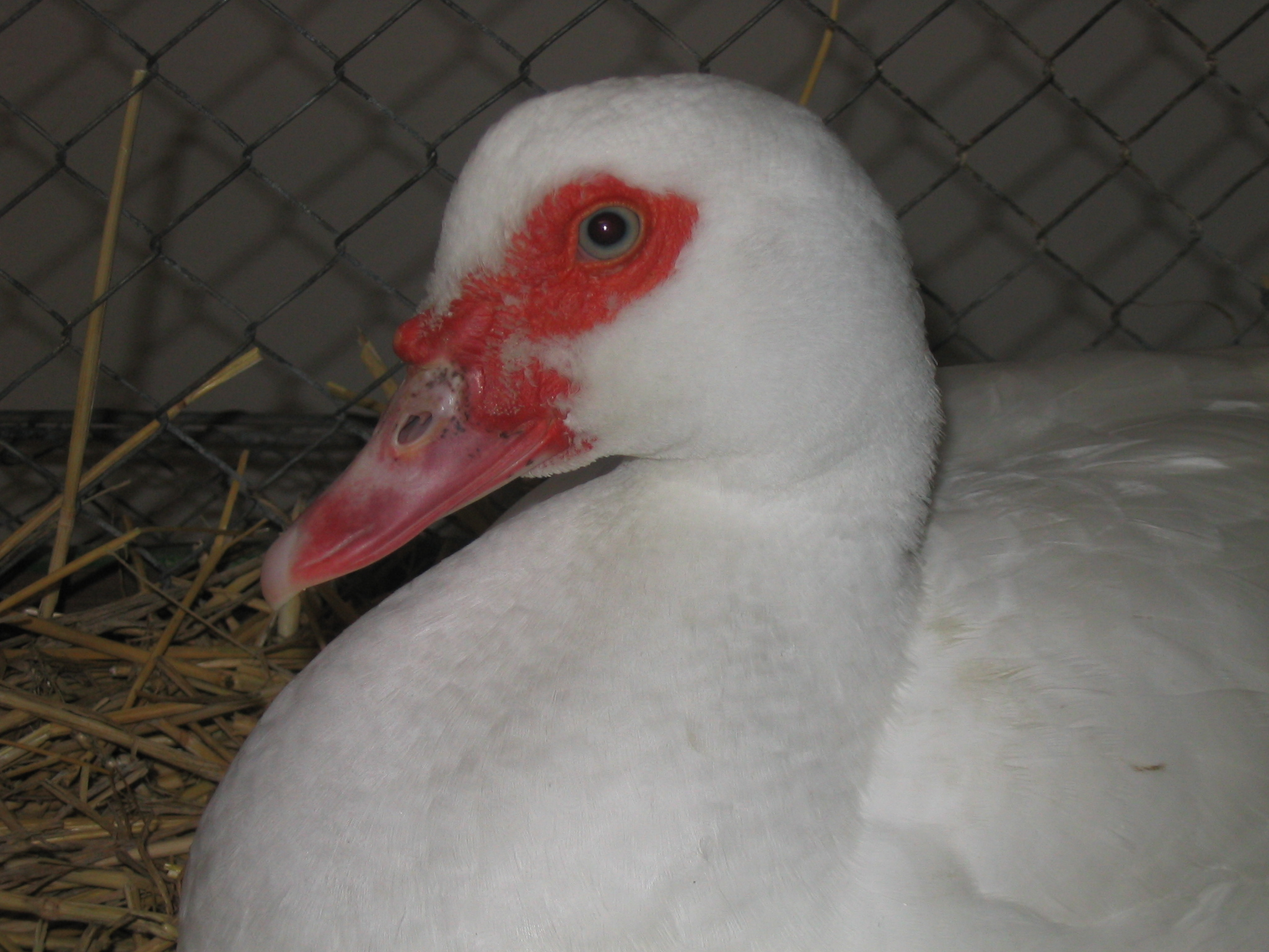 Cairina moschata, Warzenente, domestizierte Form, Domestic Mucovy Duck, fotografiert am 06.11.2004, Dr. Hagen Graebner